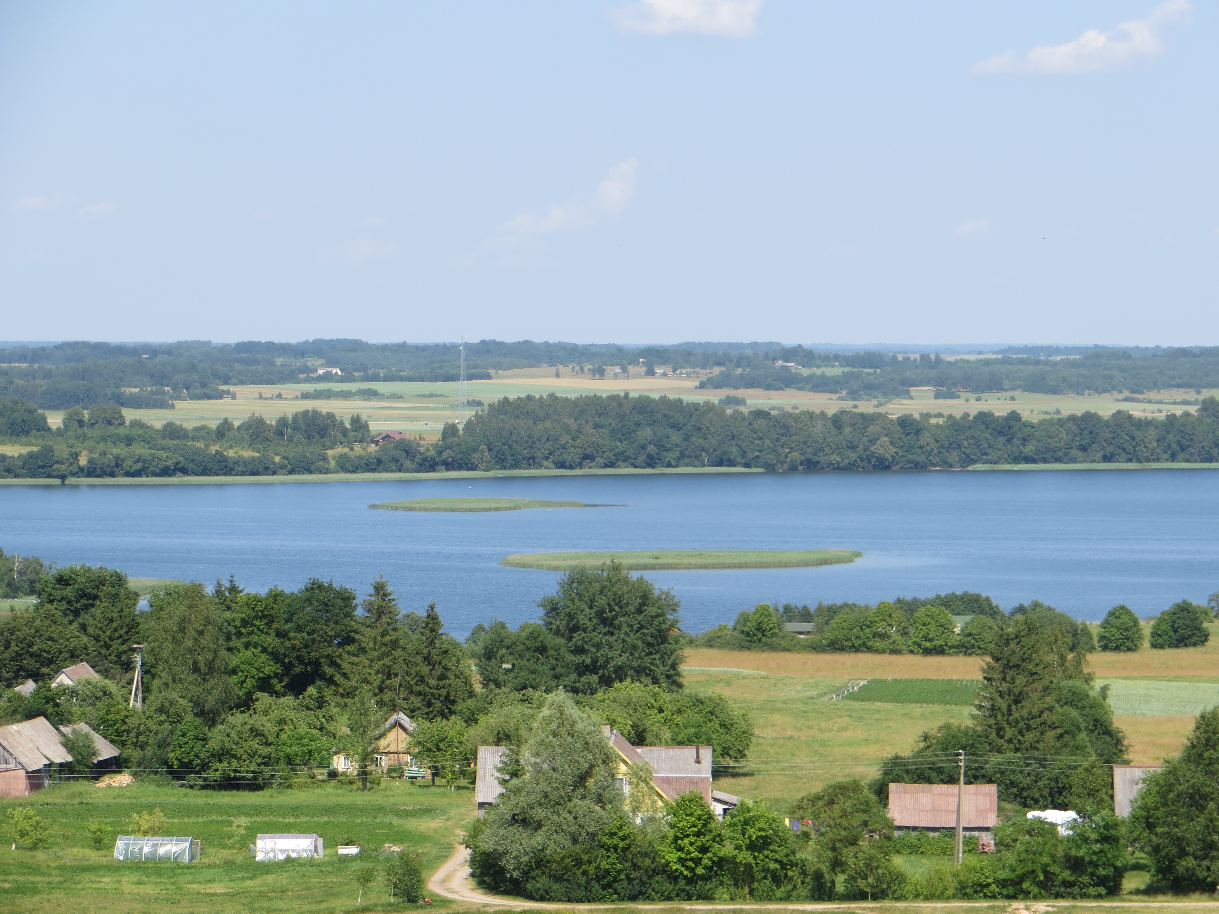 Martnonys, Lithuania